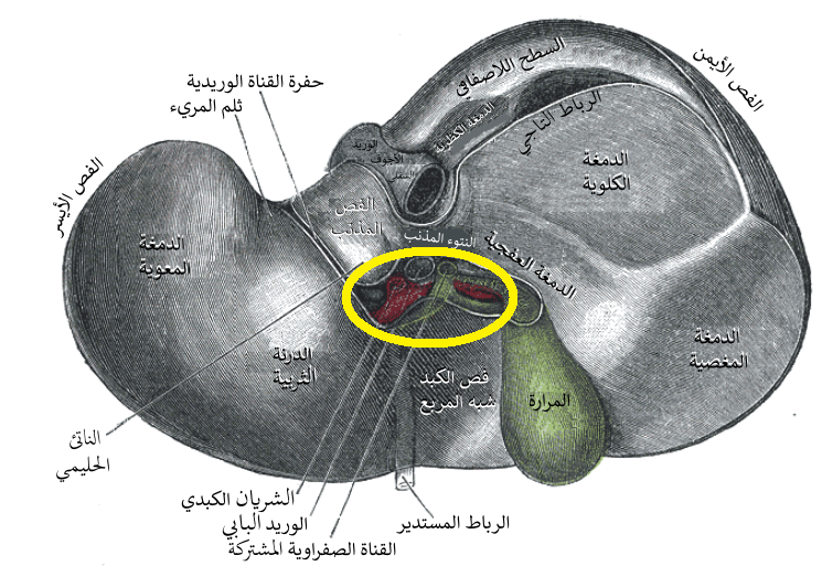 توضح الصورة أجزاء من الكبد وكذلك سرته